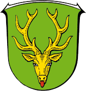 Wappen von Hirzenhain